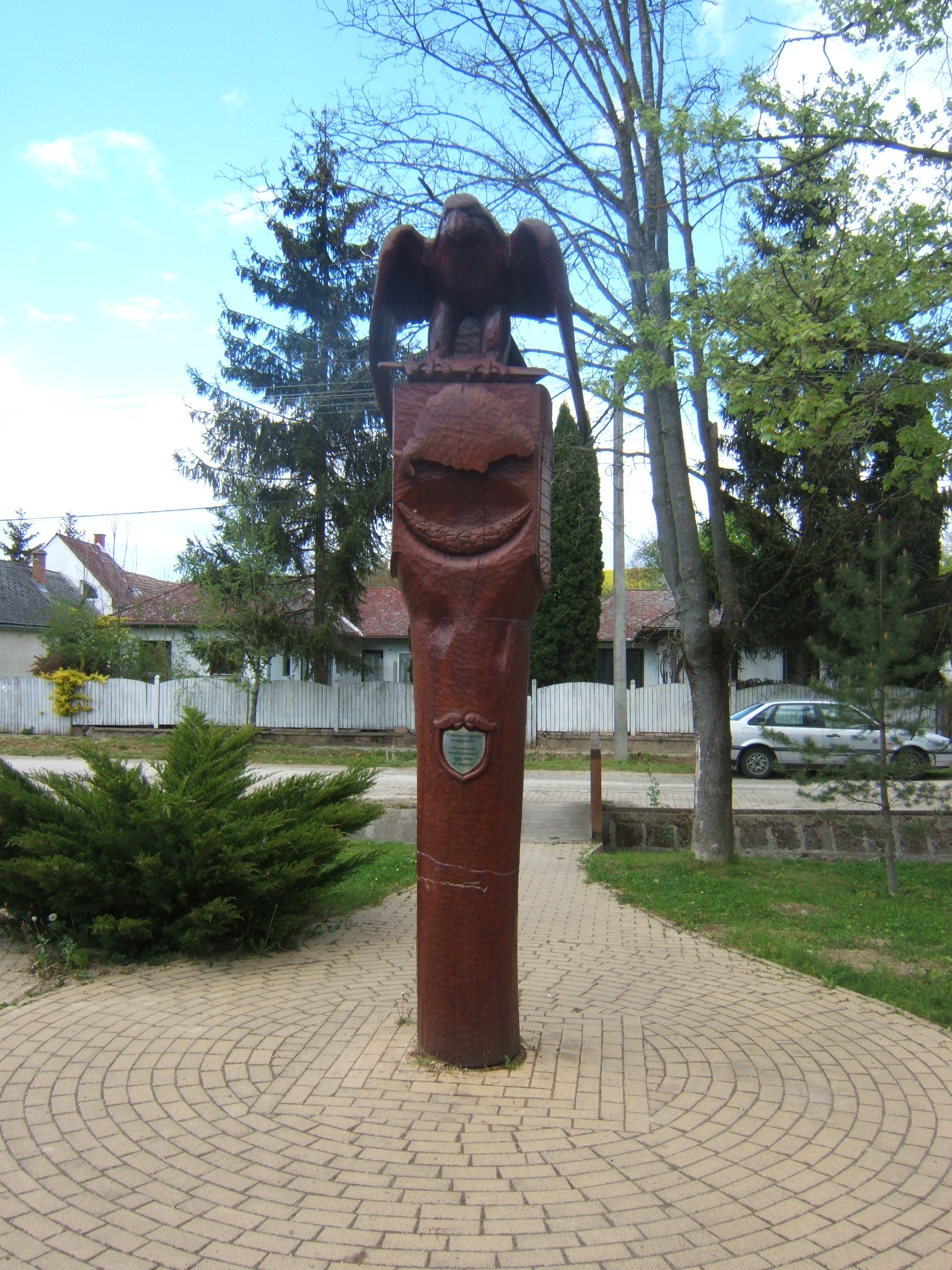 Szenna, a nemzeti egység emlékműve